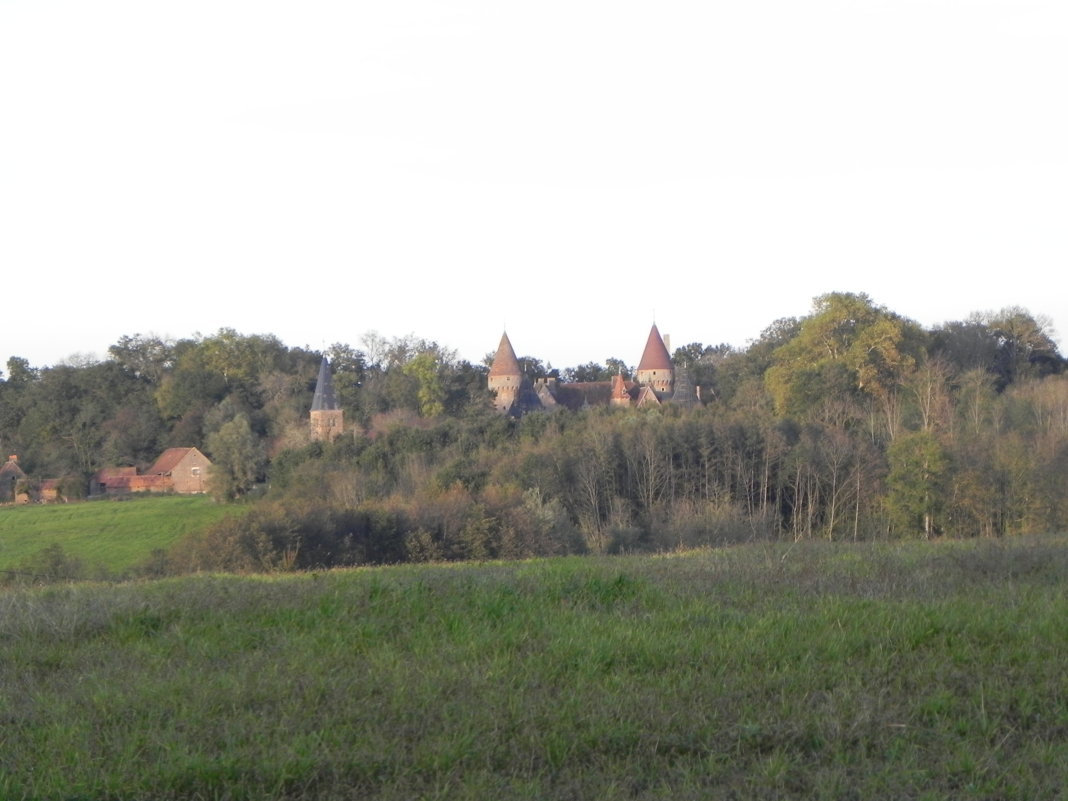 Photographie prise depuis la rue du Bois Cahuet (Montcony) du château de Montcony.